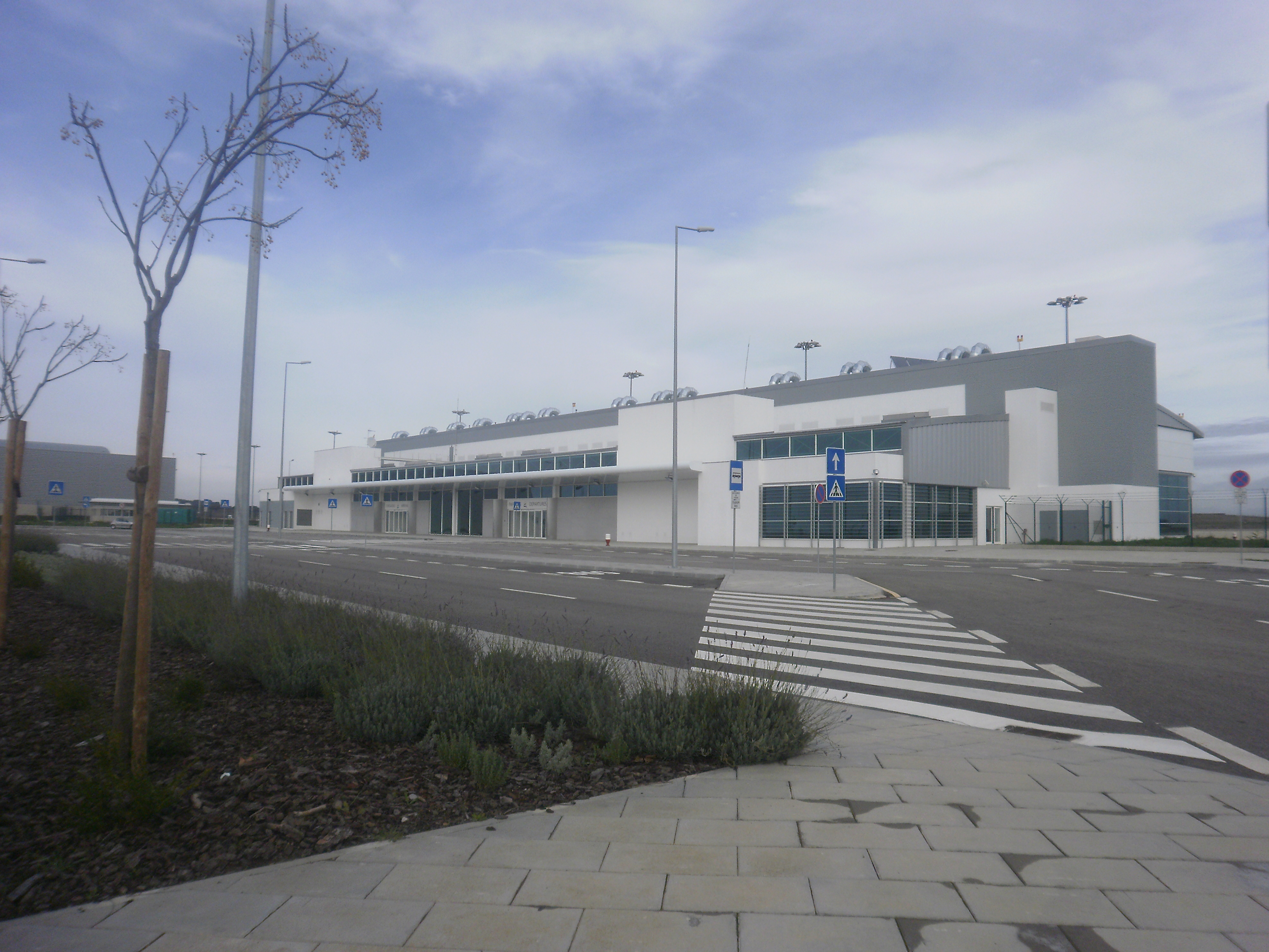 Aerogare de Beja vista do parque de estacionamento